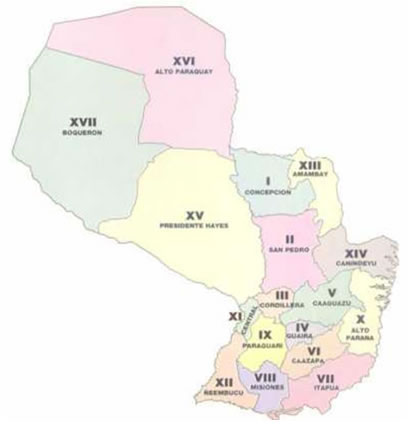 Mapa político del Paraguay